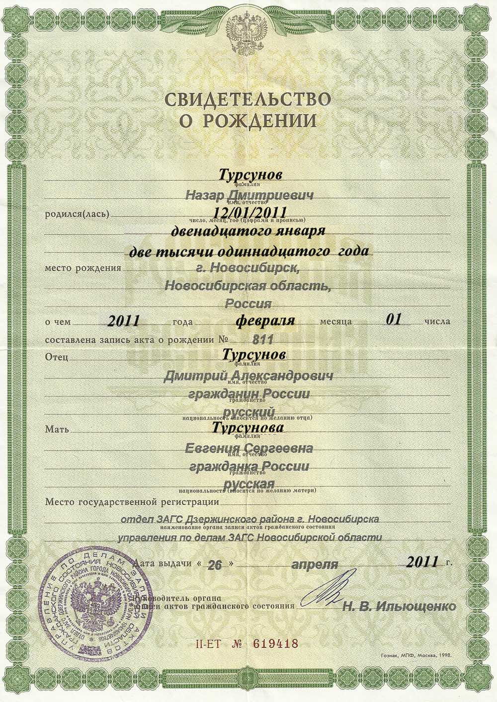 Пример свидетельства о рождении